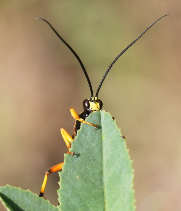 Diphyus quadripunctorius, Männchen, am 9.5.2017 am Rheinufer südlich von Mannheim